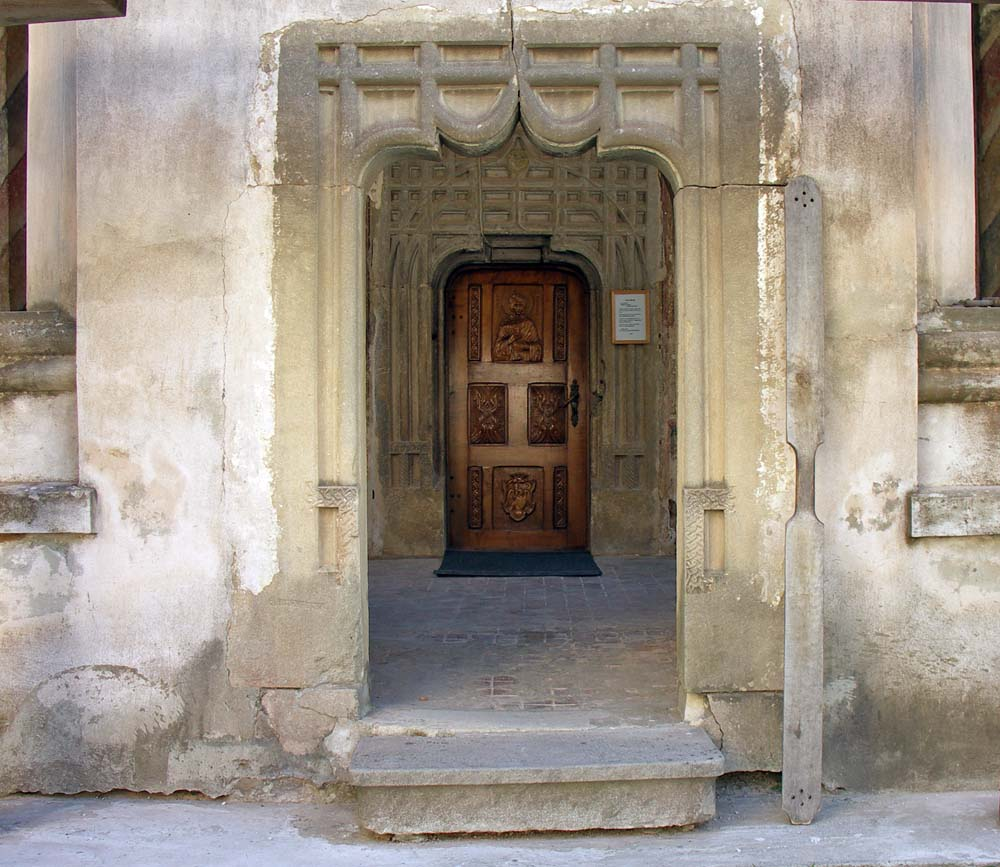 Mănăstirea Gura Motrului. Portalul de la intrare în exonartex/pridvor şi la nartex/pronaos.